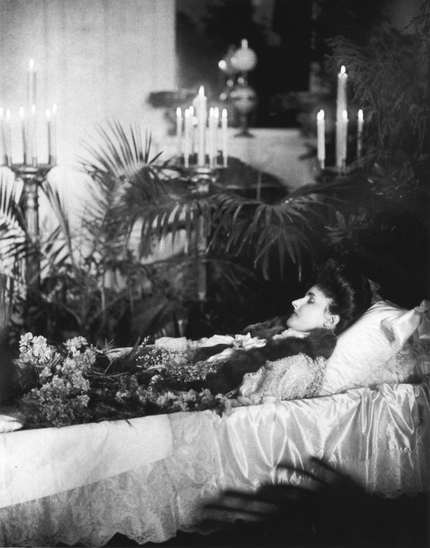 Großherzogin Caroline von Sachsen-Weimar auf ihrem Sterbebett